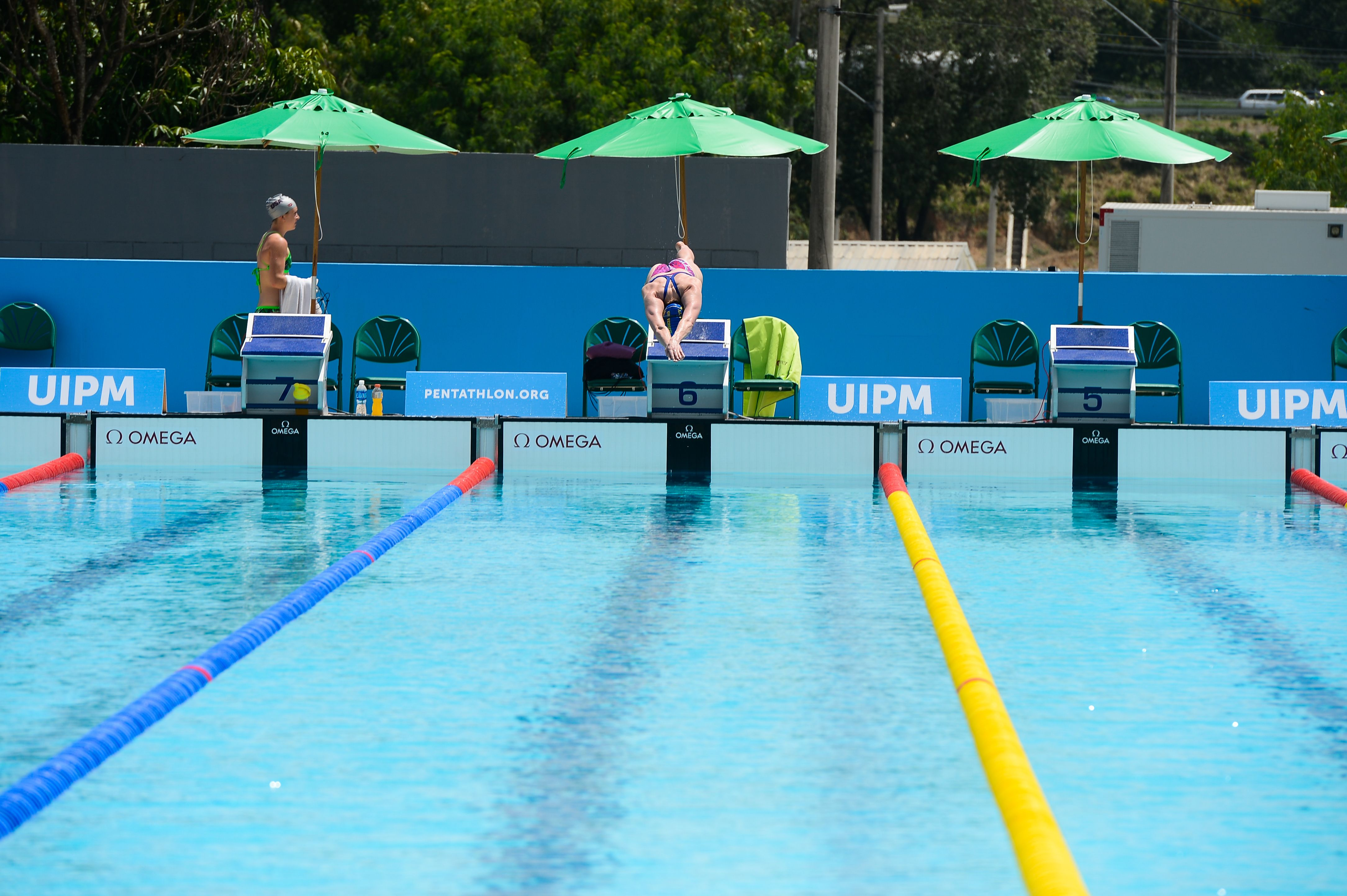 Centro Aquático do Complexo Esportivo de Deodoro